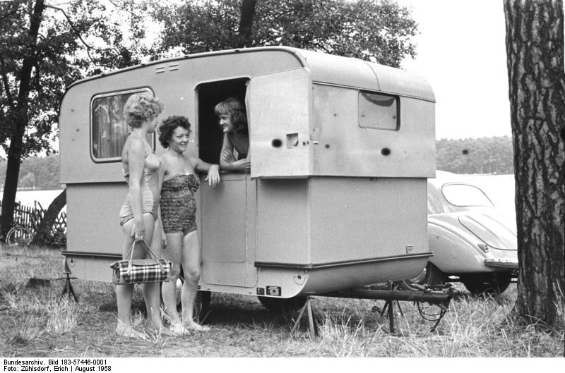 Zentralbild/Zühlsdorf 11.8.1958 Camping-Anhänger vom VEB Spezialfahrzeugwerk Berlin-Adlershof Der doppelwendige isolierte Anhänger mit Schwungachse ist fahrbereit nur 158 cm hoch und kann daher mit 70 std/km transportiert werden. Am Ziel der Reise steht mit wenigen Handgriffen das "Heim auf Rädern" bezugsfertig da. Die Anrichte mit eingebautem, 2-flammigen Kocher hat genügend Raum für Geschirr und Wäsche. Der Anhänger ist ausgestattet mit federkern-gepolsterten Sitzen, die zur Nacht eine Liegestatt für 3 Personen ergeben. UBz: Aussenansicht des Camping-Anhängers.